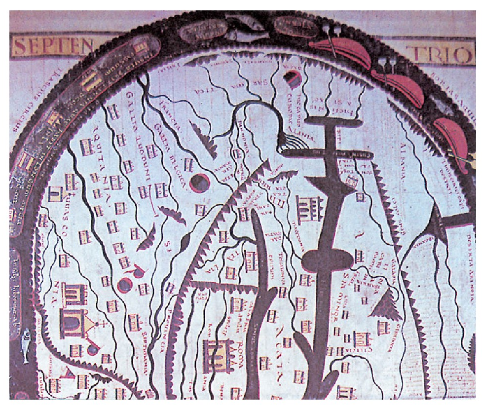 XI. mendeko mapa mundi honetan agertzen da lehenengo aldiz “Wasconia”. Stéphane Garsie, St.-Sever monasteriokoa (Parisko Bibliothèque Nationale).